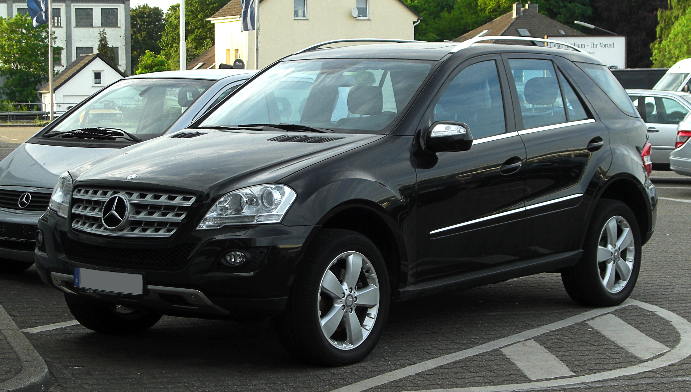 Mercedes-Benz M-Klasse (W 164, Facelift)